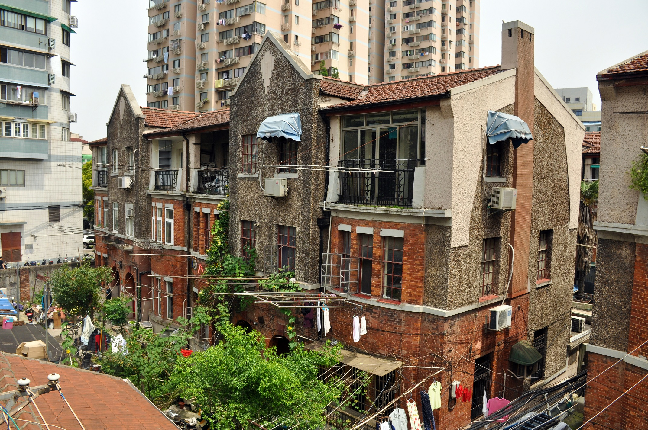 公园坊连氏家族老宅 西江湾路476弄8号